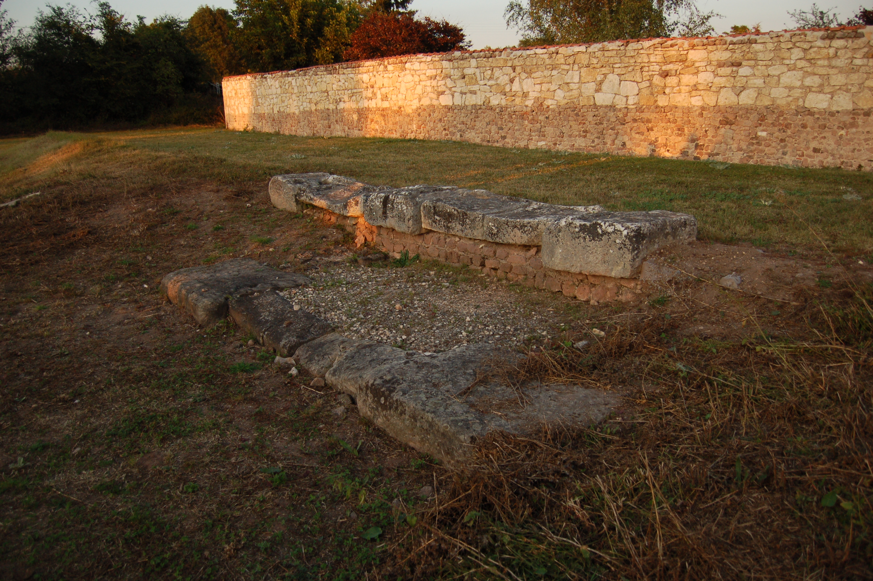 Ruines de l'entrée du Forum gallo-romain de Drevant, Cher, France.